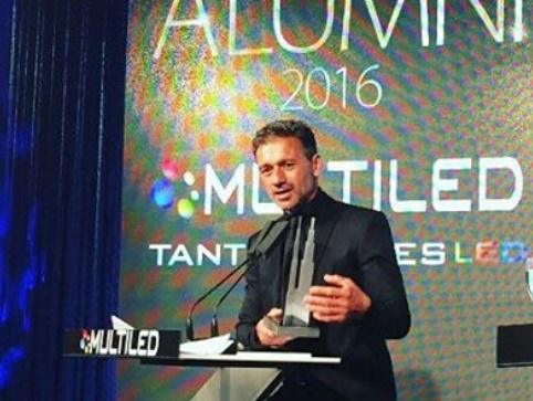 Vivas recibiendo el Premio Alumni al mejor entrenador del fútbol argentino del año 2016.